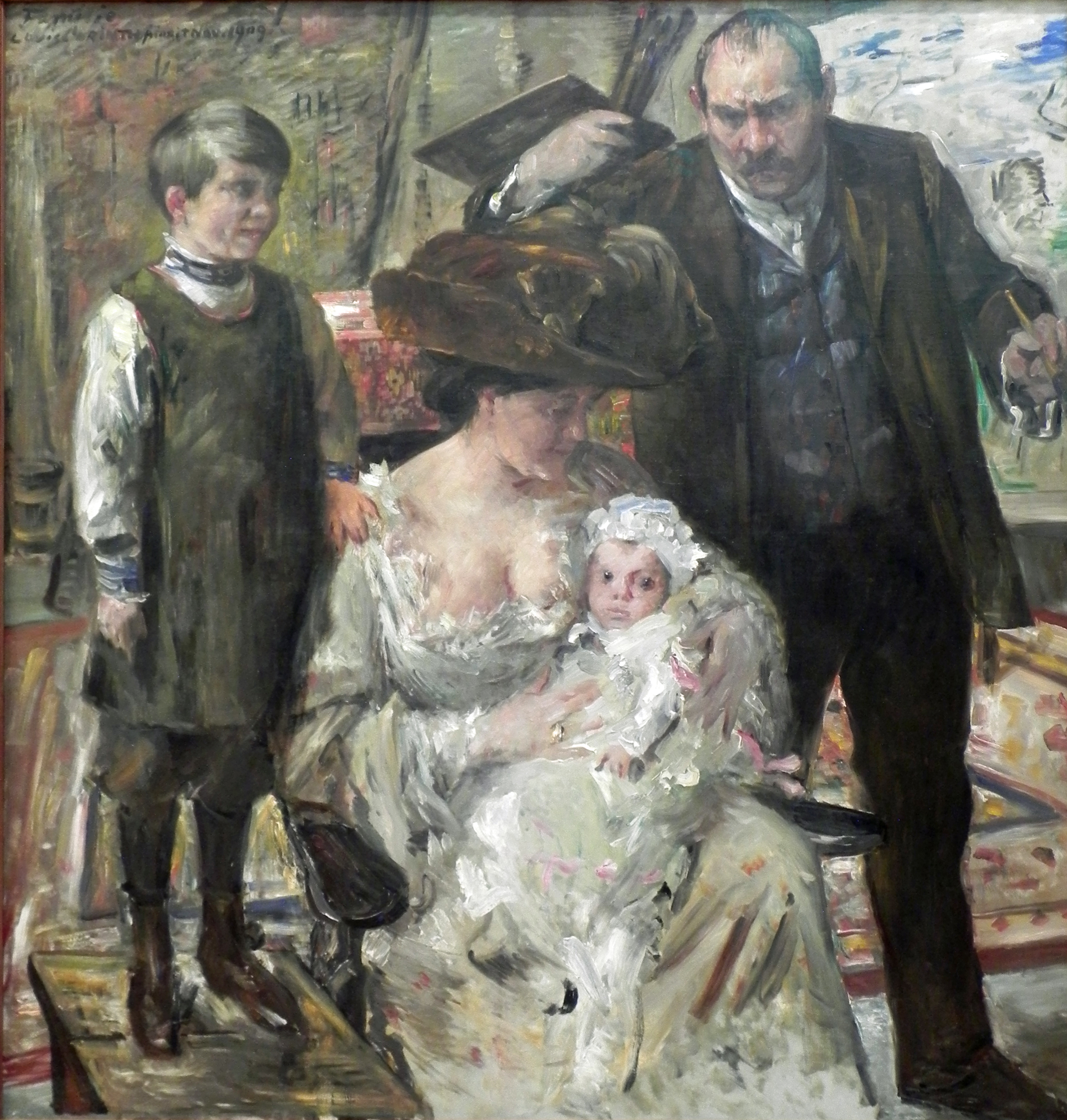 Lovis Corinth mit seiner Frau Charlotte Berend-Corinth, seinem 5-jährigen Sohn Thomas und der fünf Monate alten Tochter Wilhelmine.